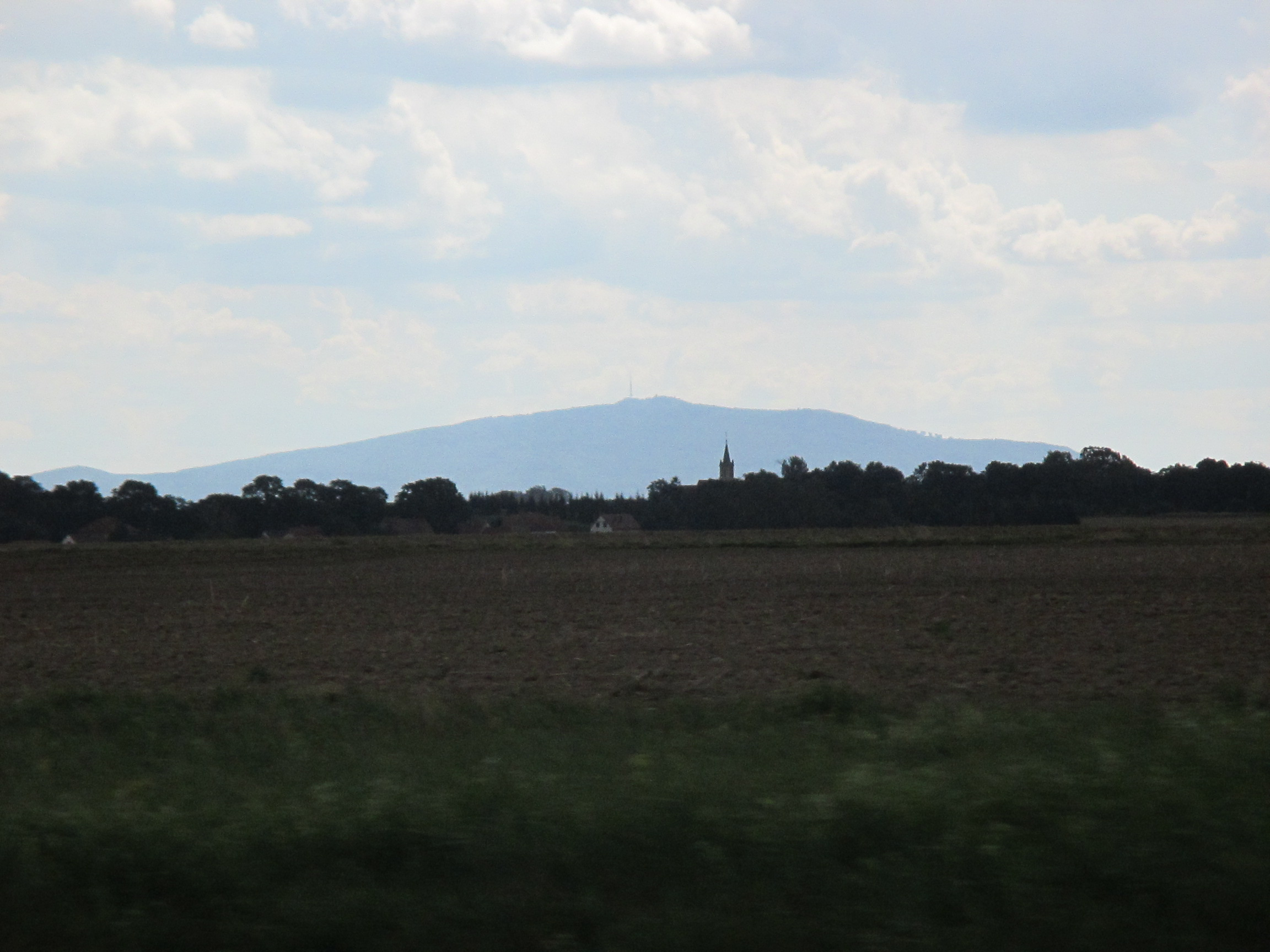 Ślęża widziana od północy, z autostrady A4